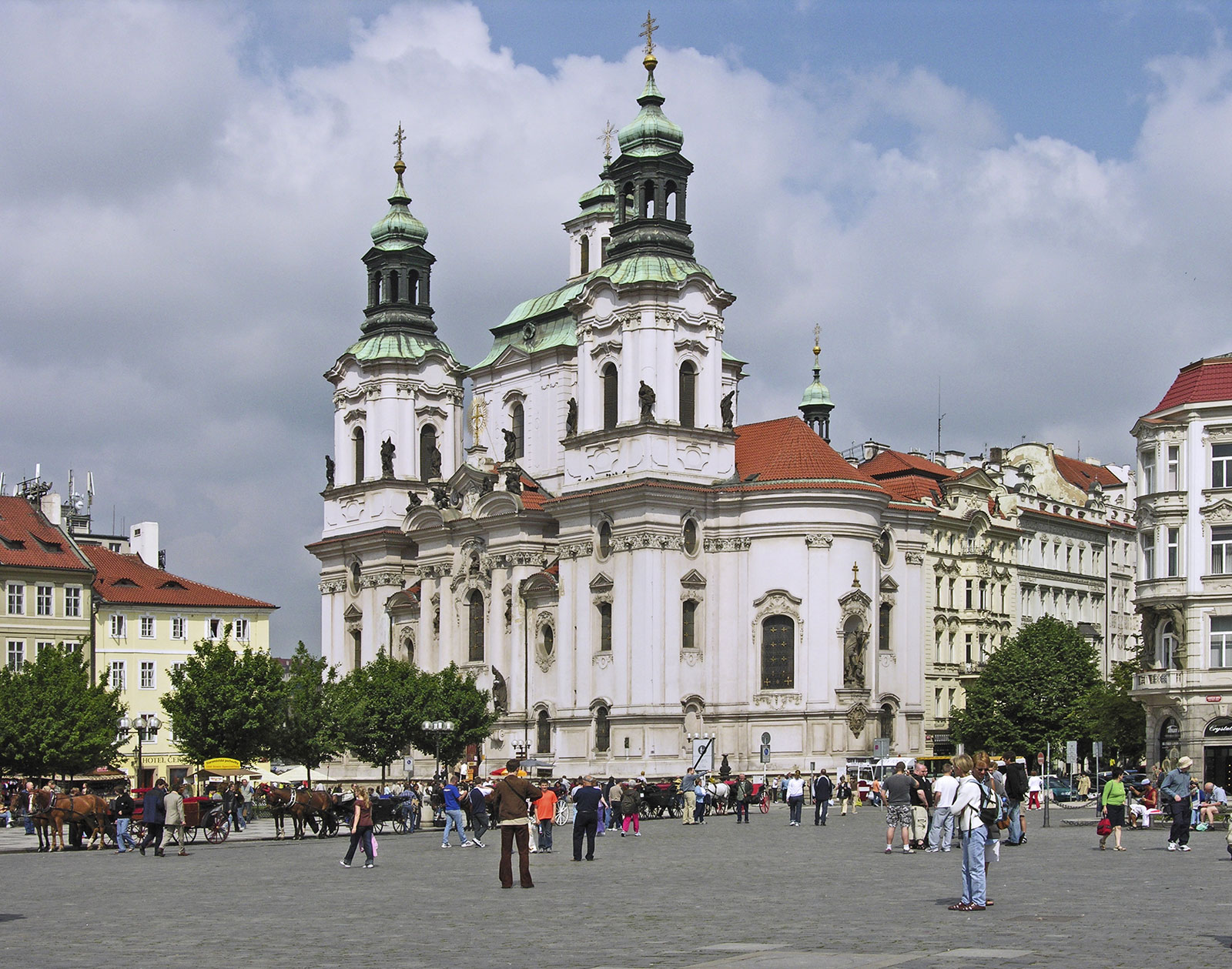 St. Nikolaus, Altstädter Ring